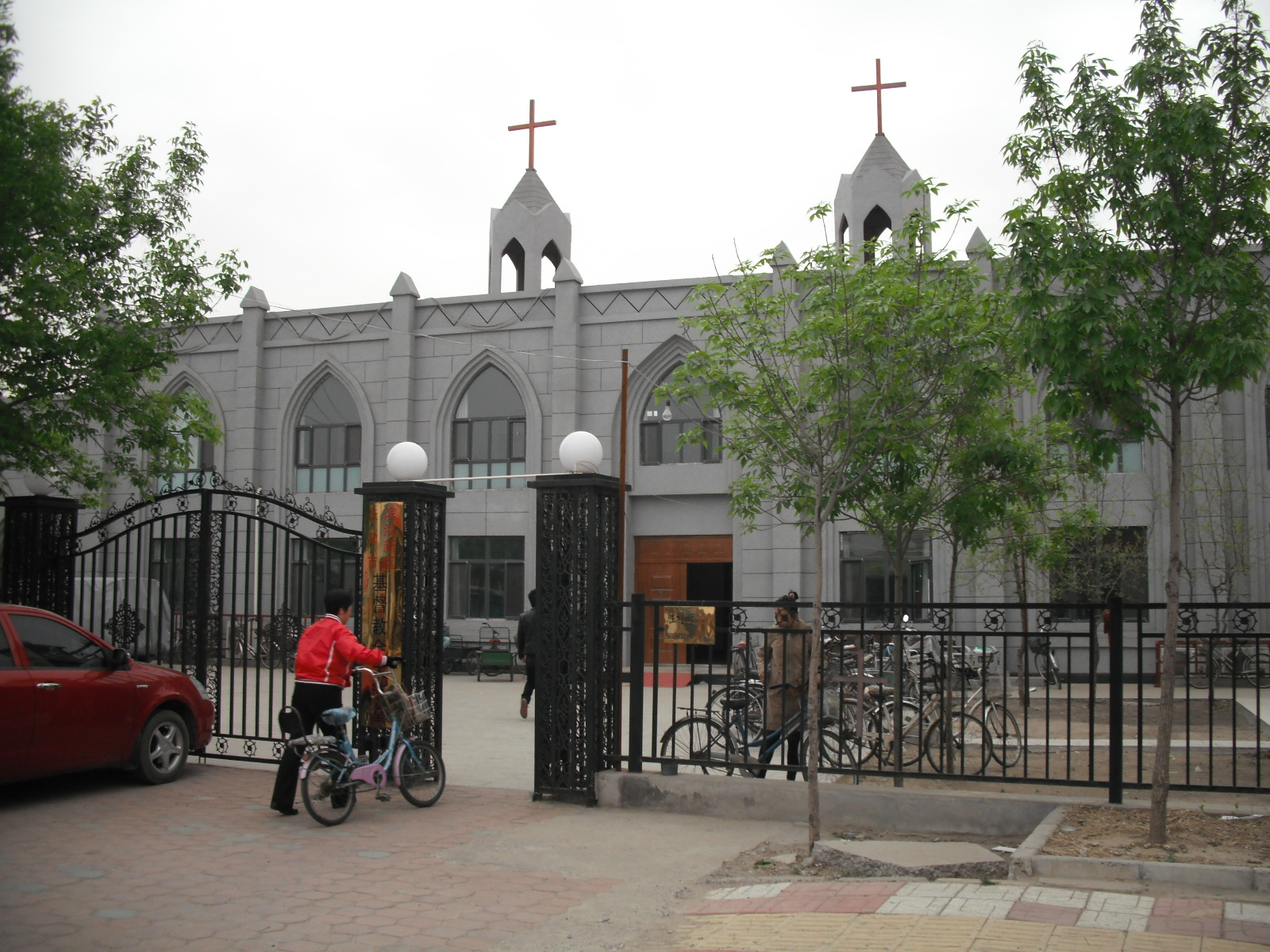 中文（中国大陆）: 大港堂正门。